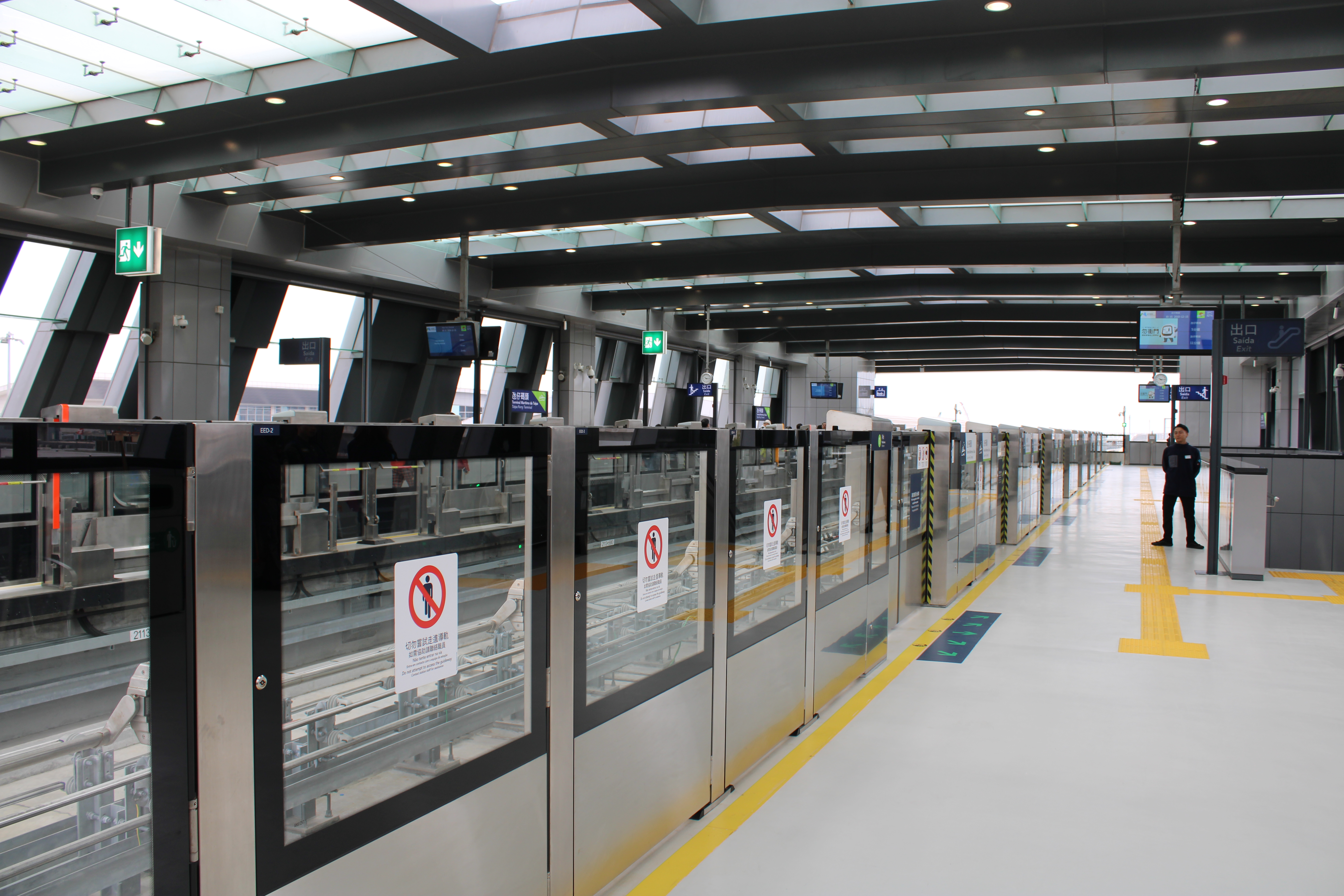 2019年12月的澳門輕軌氹仔線氹仔碼頭站月臺。